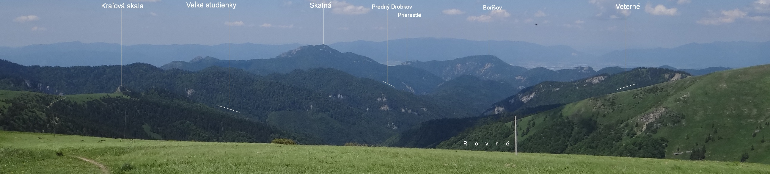 Dedošová dolina. View from Krížna